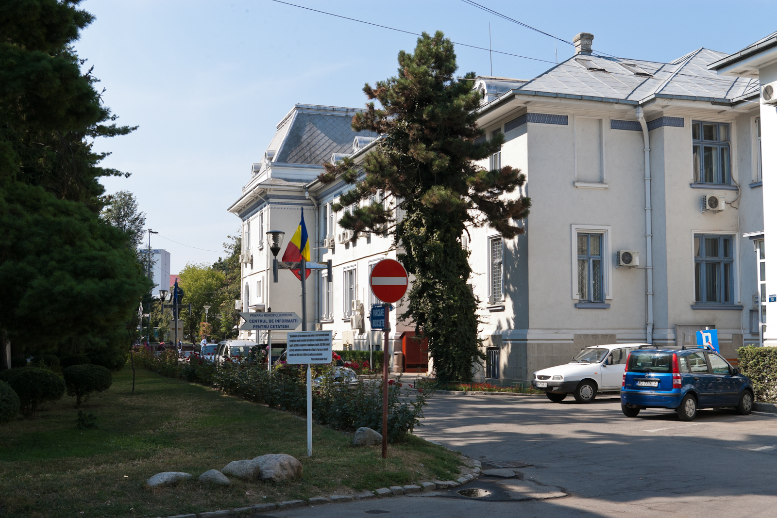 Fotografia prezinta ansamblul Primariei vazut dinspre NE.